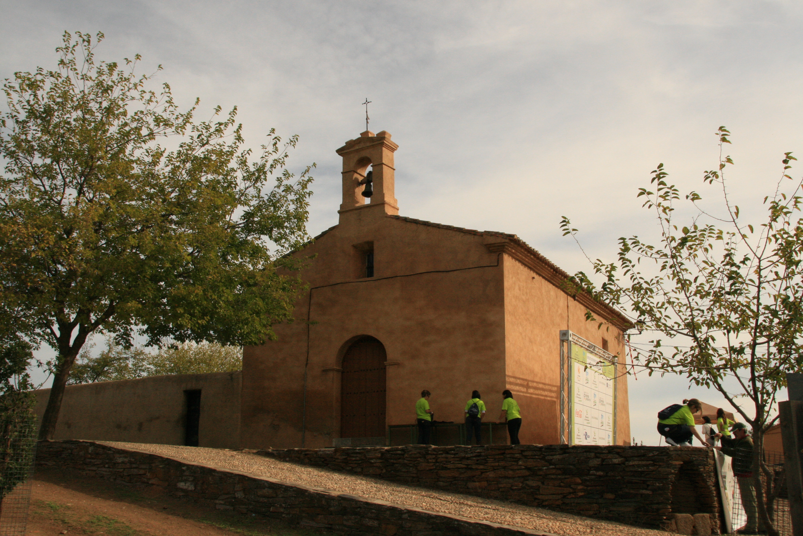 Ermita de Nuestra Señora del Socorro, en Villarreal de San Carlos, junto al P. N. de Monfragüe